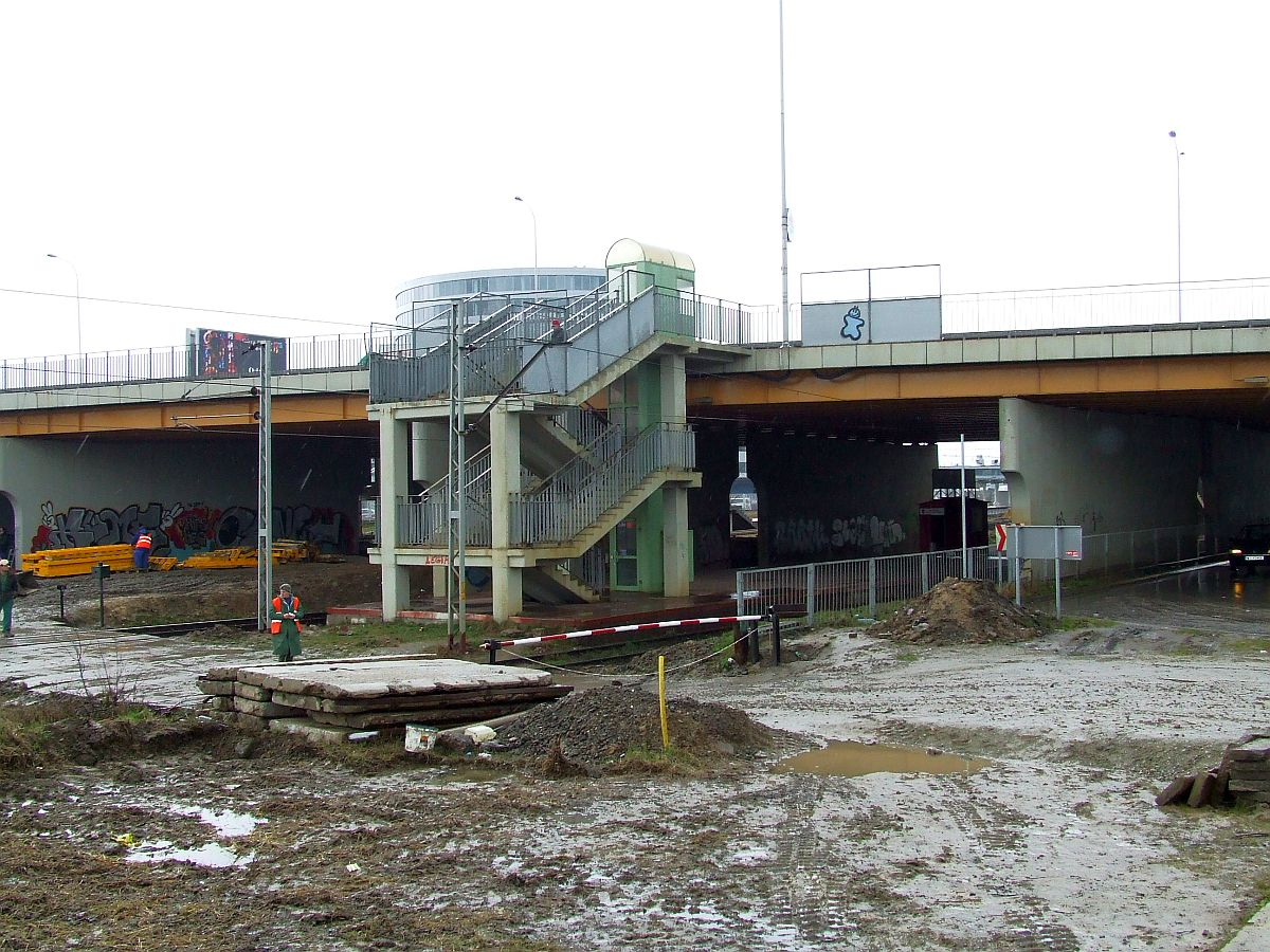 Warszawa Al. Jerozolimskie railway station